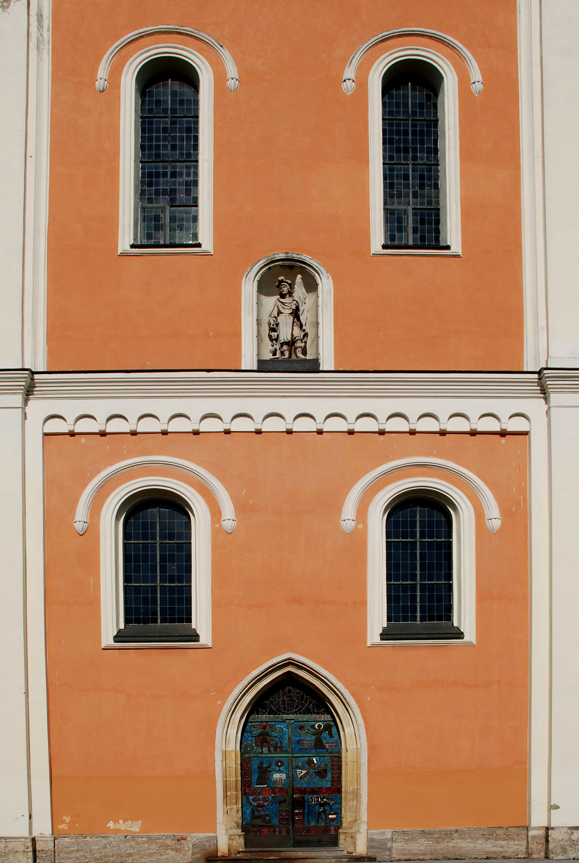 Groß Sankt Florian, Steiermark, Österreich: Kirche - bis in das 18. Jahrhundert Sitz des Archidiakons bzw. Kommissars des Bistums Lavant für dessen Bereich in der Weststeiermark.